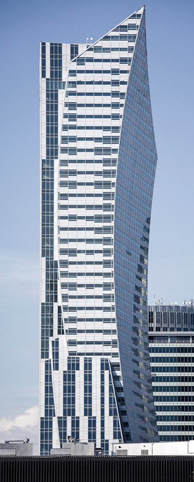 Stan na 2 października 2014.